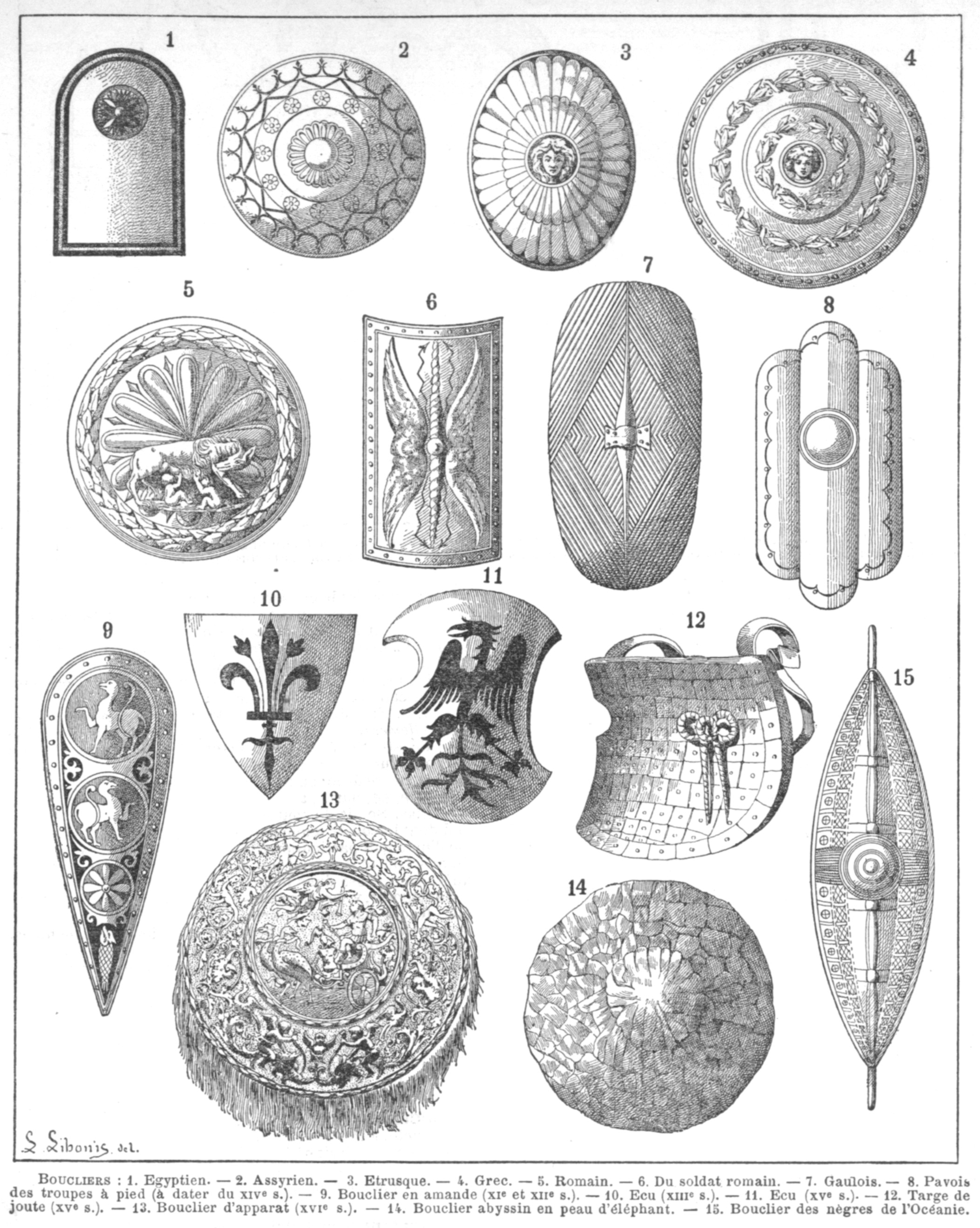 BOUCLIERS: 1. Egypticien. — 2. Assyrien. — 3. Etrusque. — 4. Grec. — 5. Romain. — 6. Du soldat romain. — 7. Gaulois. — 8. Pavois des troupes à pied (à dater du XIV S.). — 9. Bouclier en amende (XI et XII S.). — 10. Ecu (XIII S.). — 11. Ecu (XV S.). — 12. Targe de joute (XV S.). — 13. Bouclier d'apparat (XVI S.). — 14. Bouclier abyssin en peu d'éléphant. — 15. Bouclier des nègres de l'Océanie.